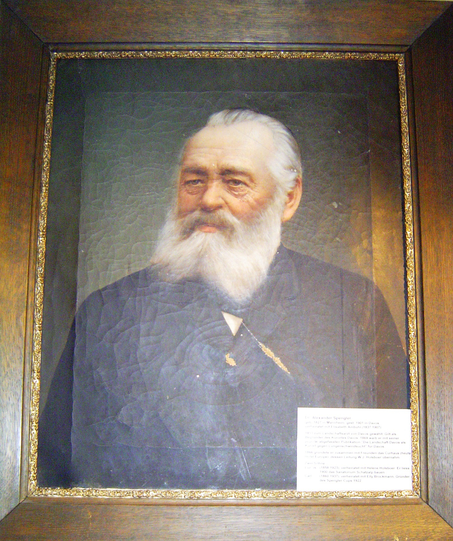 Alexander Spengler im Heimatmuseum Davos